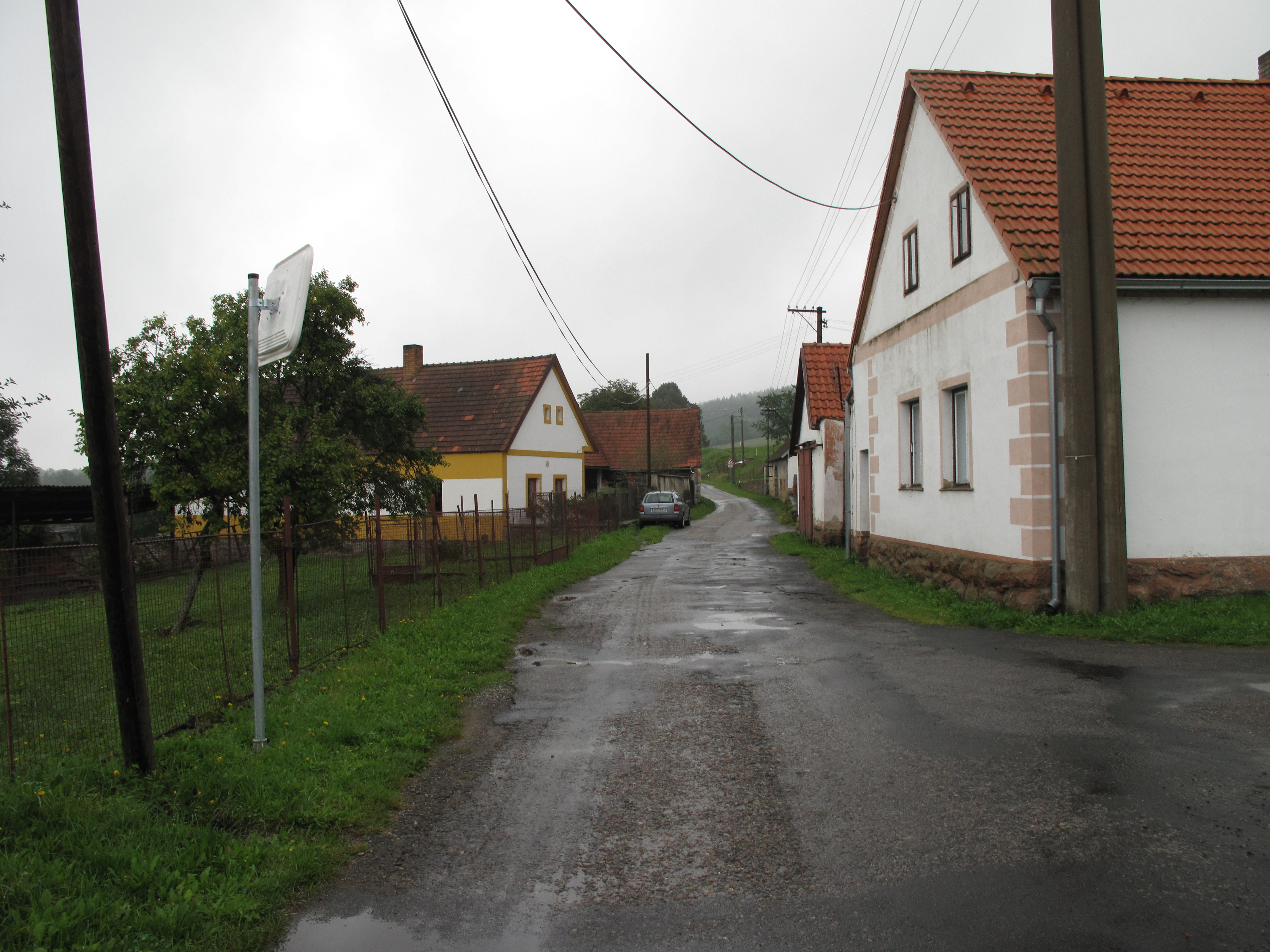 Domy u cesty v Nuzíně. Okres Strakonice, Česká republika.